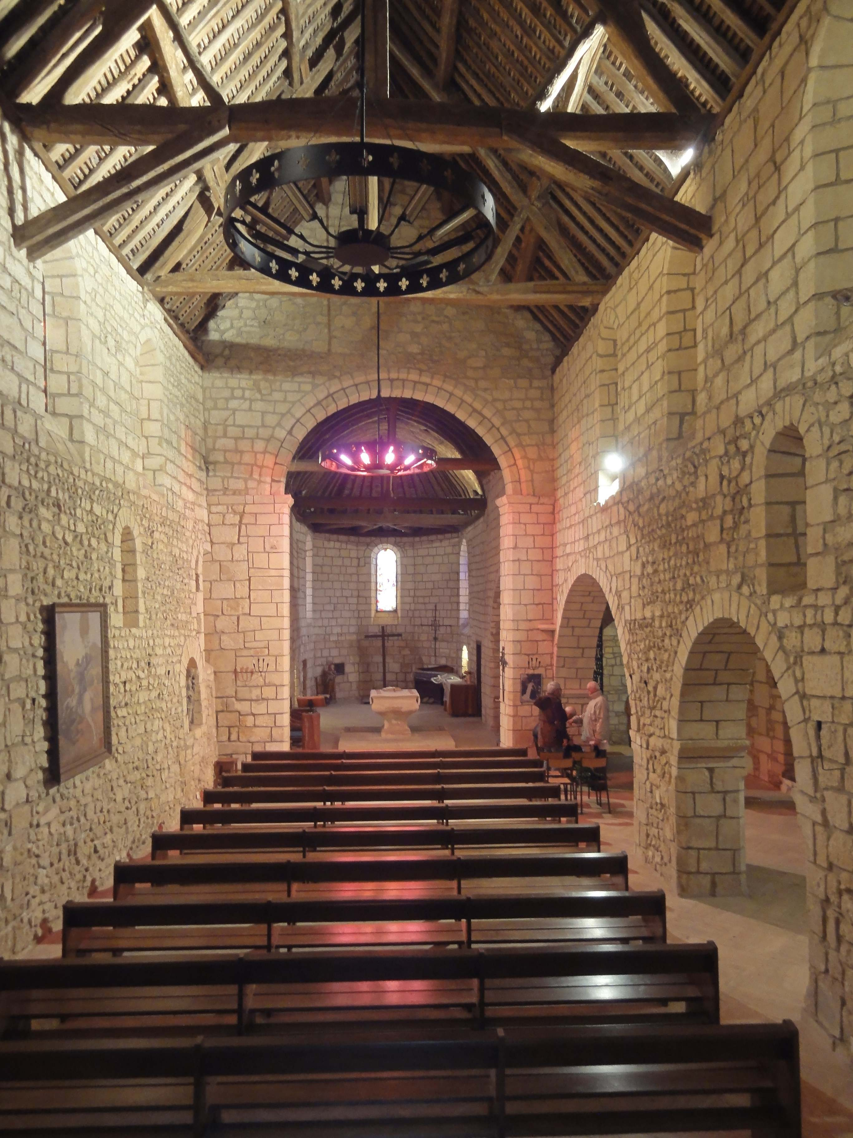 Intérieur de l'église - voir titre.